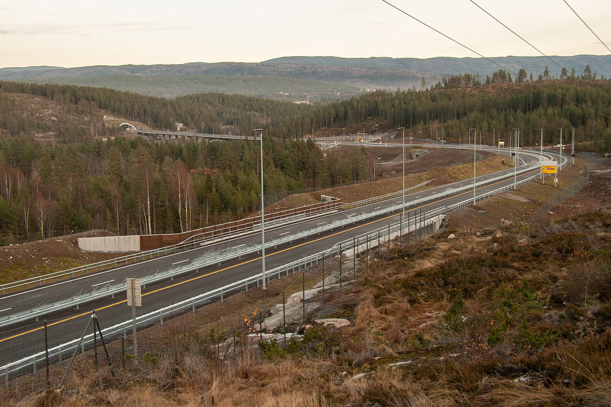 Ny E134 nedover Lassedalen.